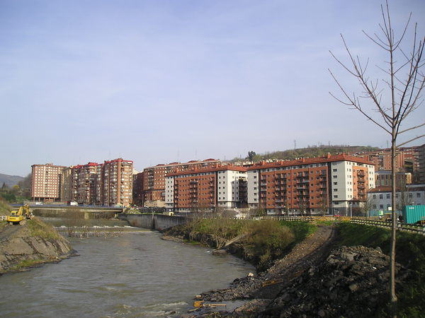 Nerbioi ibaia eta Arrigorriagako Santa Isabel auzoa.